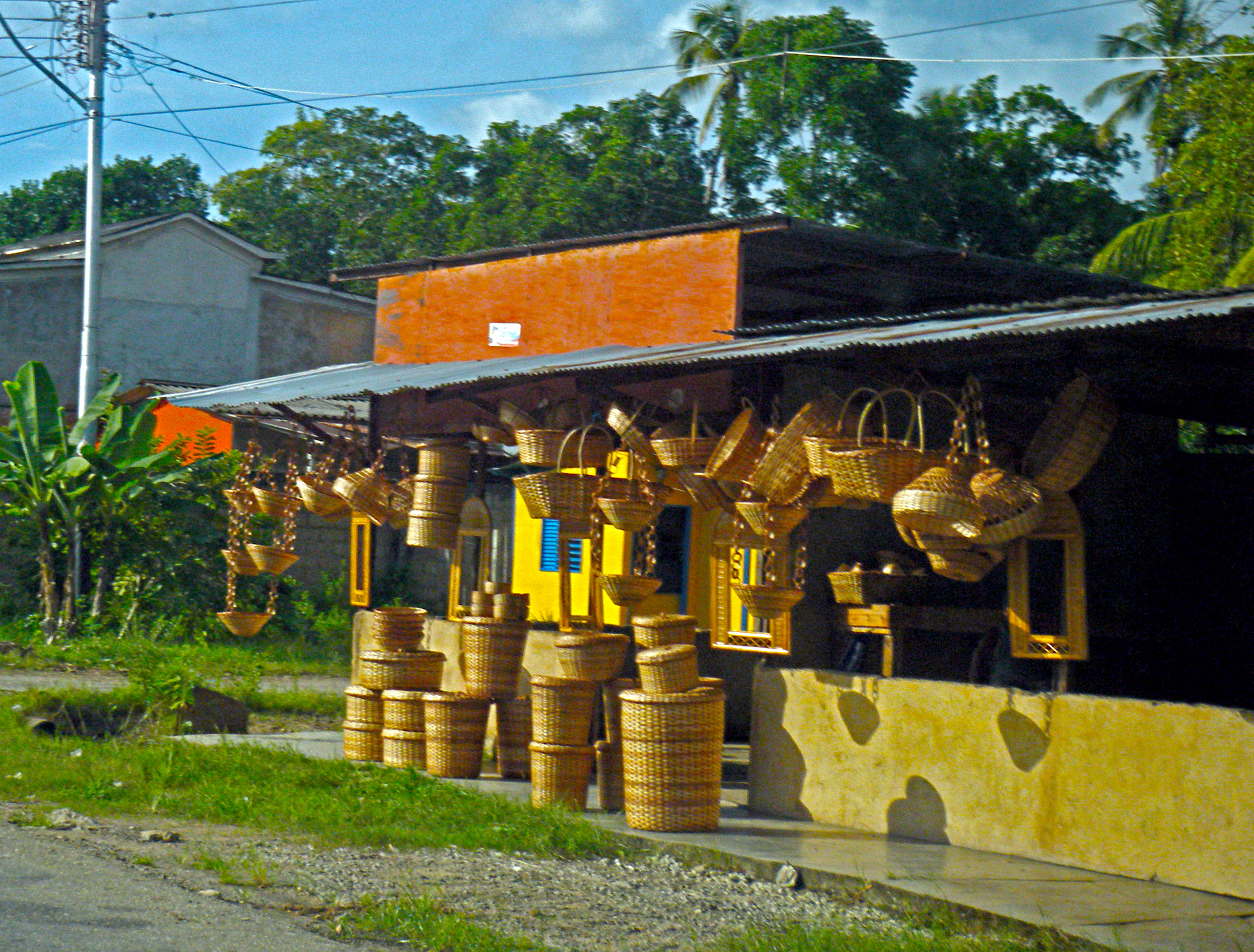 Artesanía en via nacional del Municipio Punceres, Estado Monagas, Venezuela.